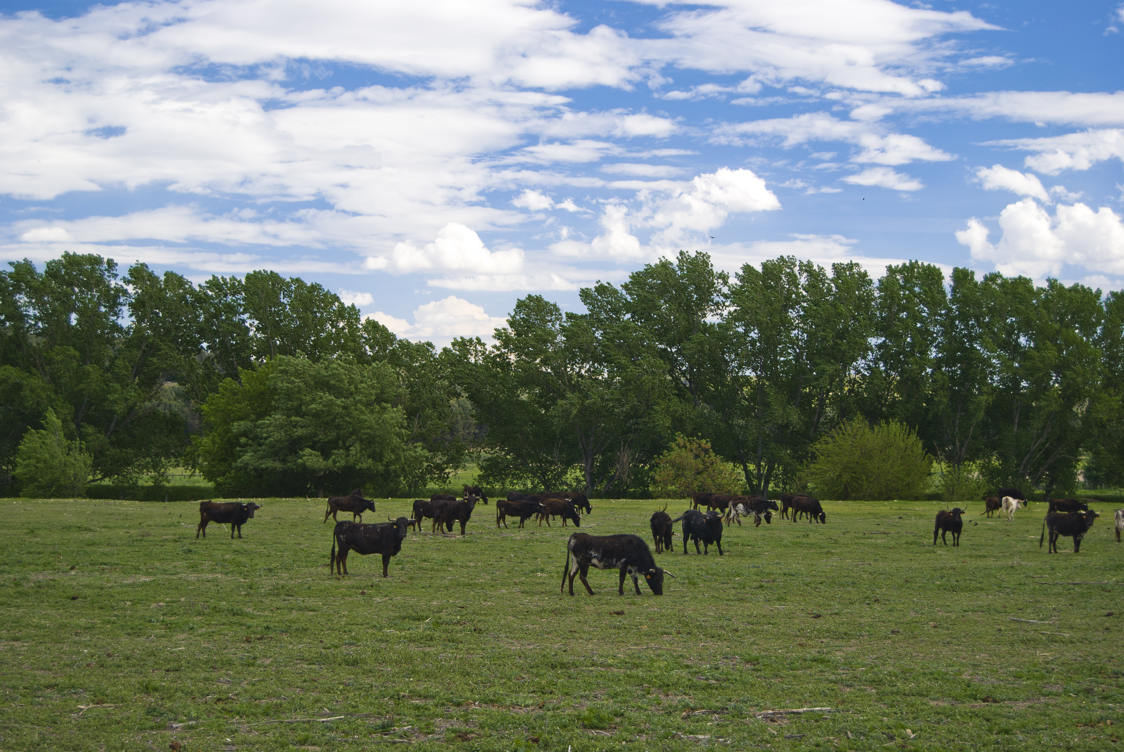 LIC ES3110006 - Comarca de las Vegas - Rivas Vaciamadrid - Parque Regional del Sureste This is a photography of a Site of Community Importance in Spain with the ID: ES3110006. Natura2000 entry, EEA entry